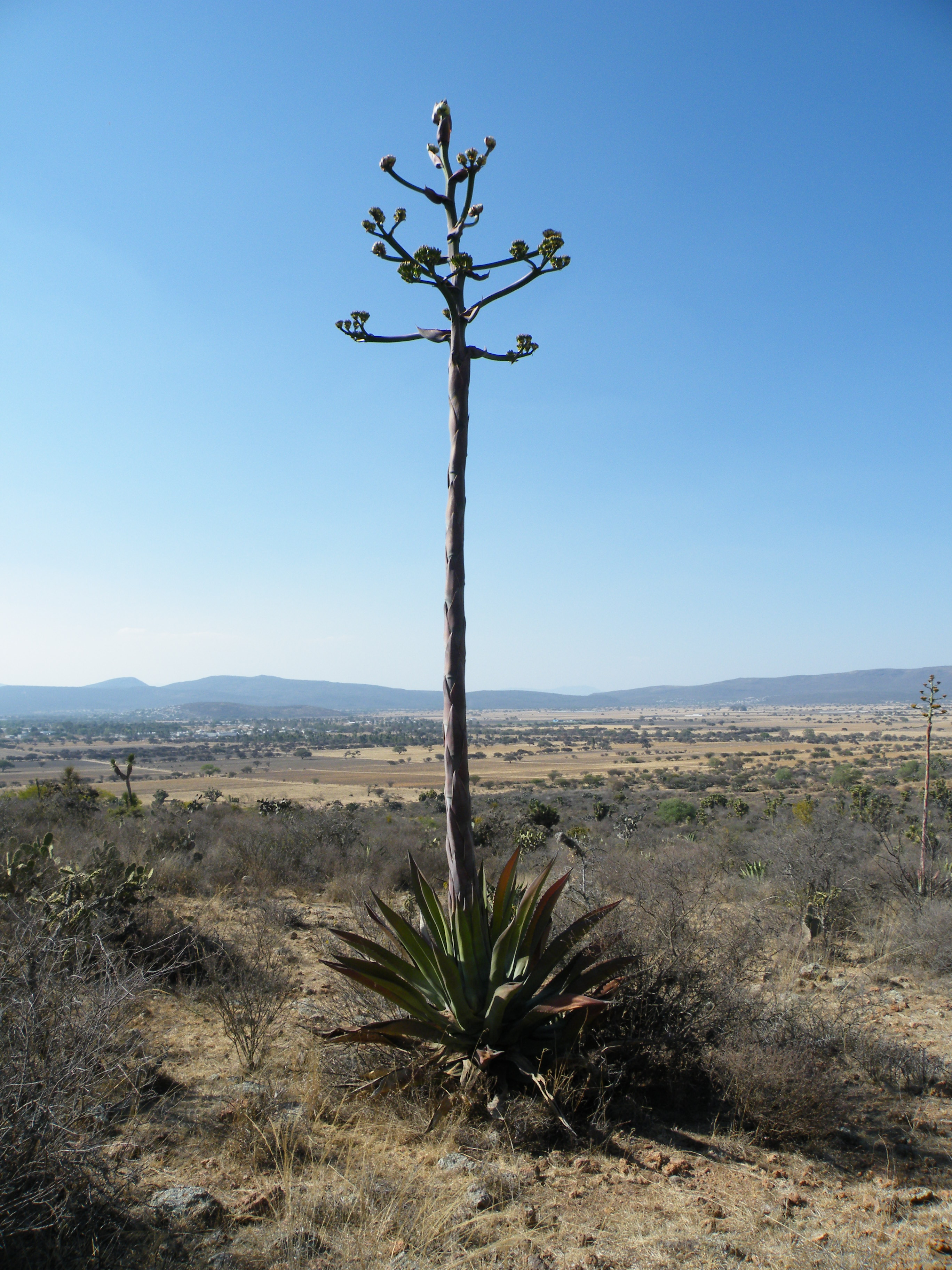 Cadereyta, Queretaro